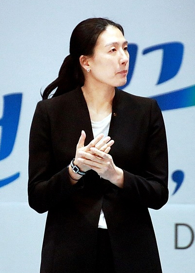 160101 여자농구 신한은행 vs 우리은행 직찍 1. 전주원